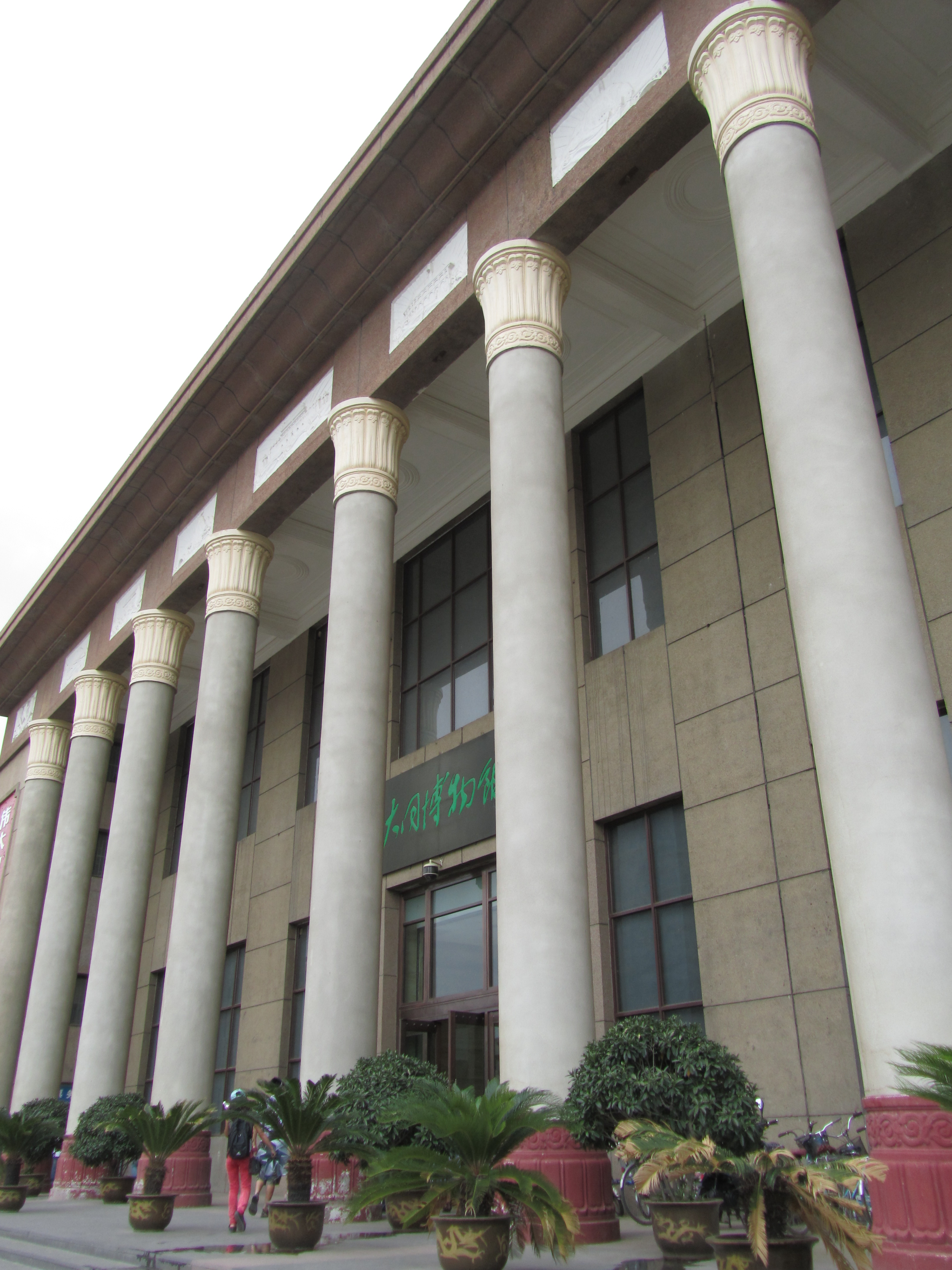 大同博物馆门廊。